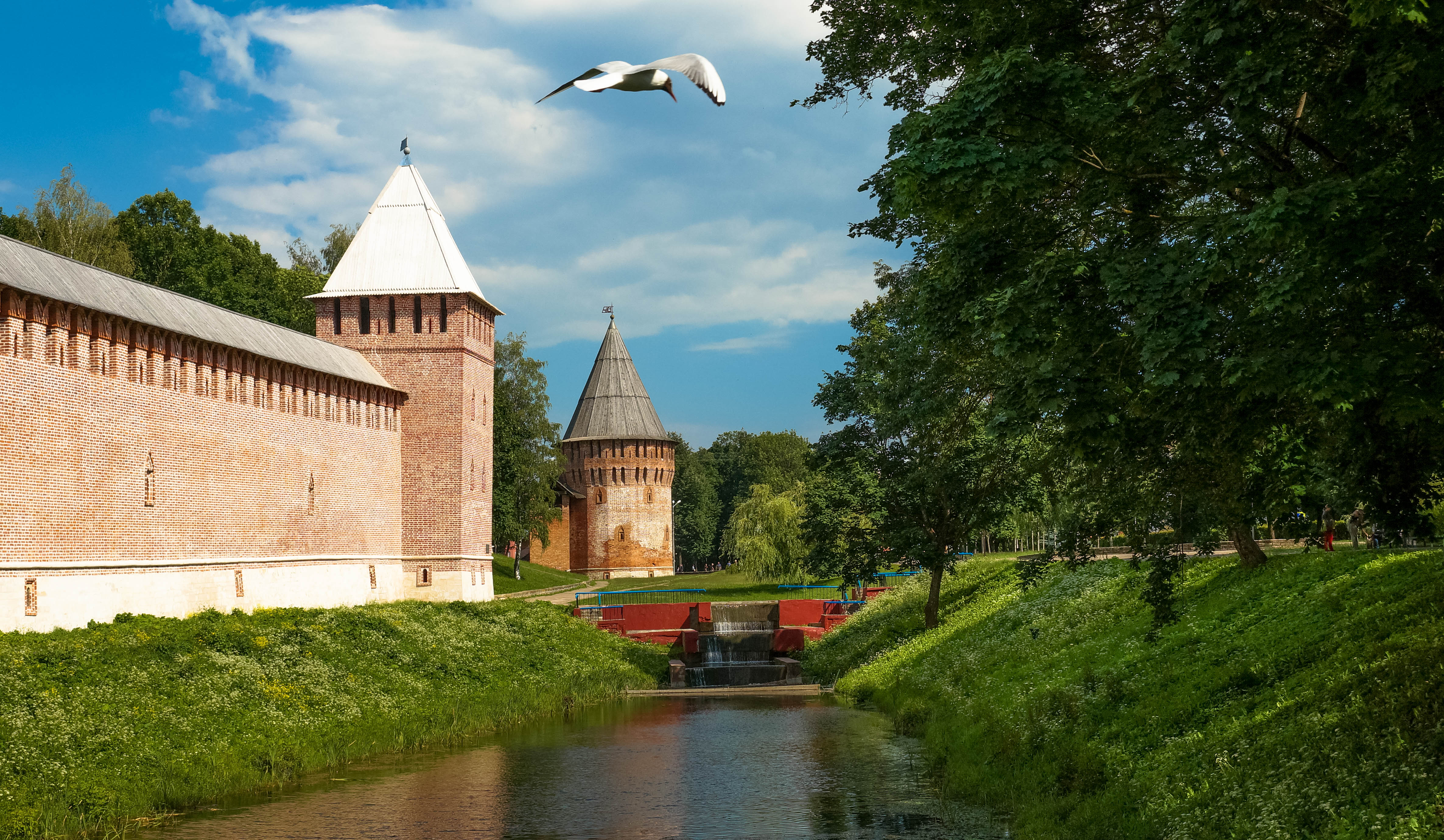 Прясла стен: Смоленск, Смоленский район, Смоленская область